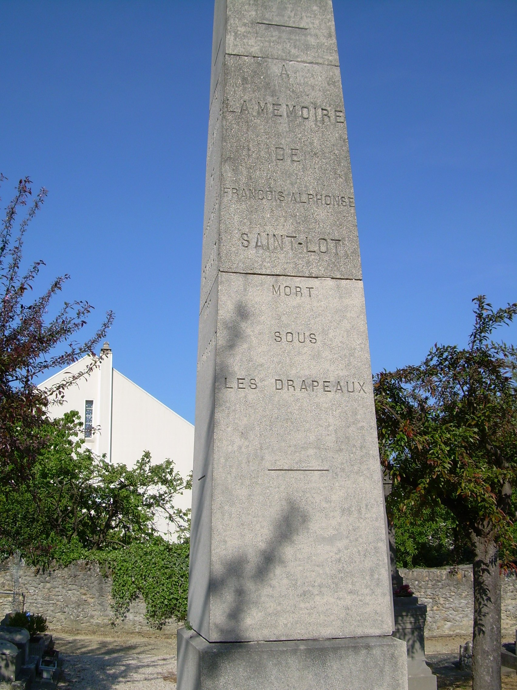 Monument guerre 1870 Epinay sur Orge